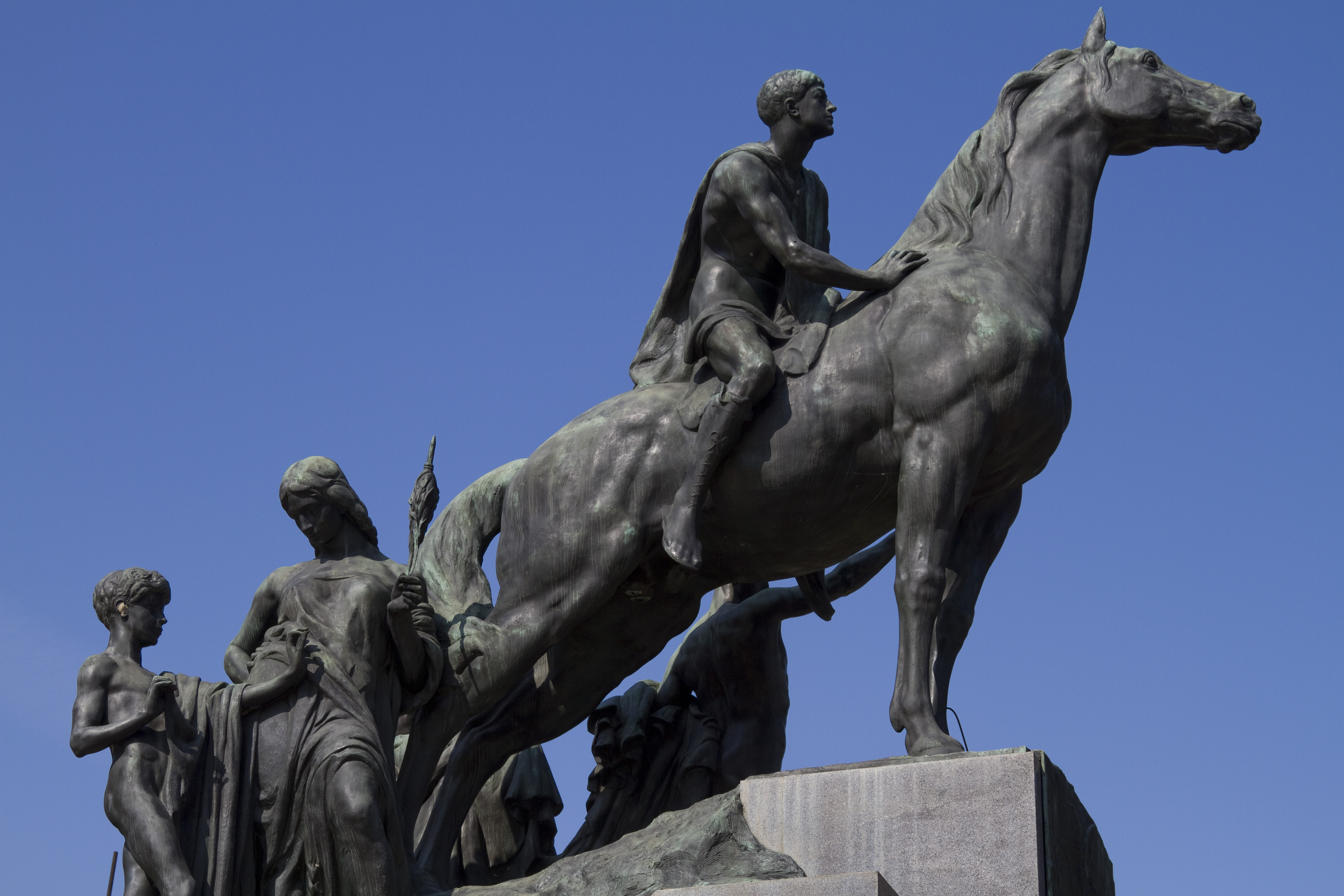 Monumento equestre a Enrico Dell'Acqua This is a photo of a monument which is part of cultural heritage of Italy.